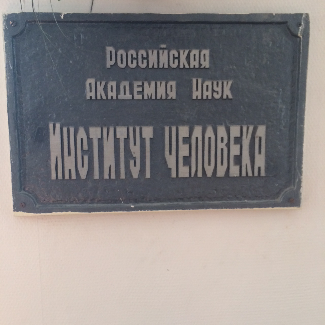 Табличка на входе Института человека РАН. В настоящее время хранится в Институте философии РАН